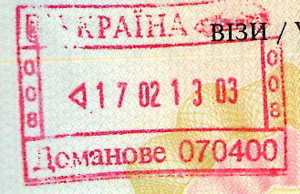 Штамп МАПП "Доманове"